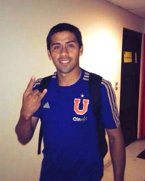 Volante Club Universidad de Chile